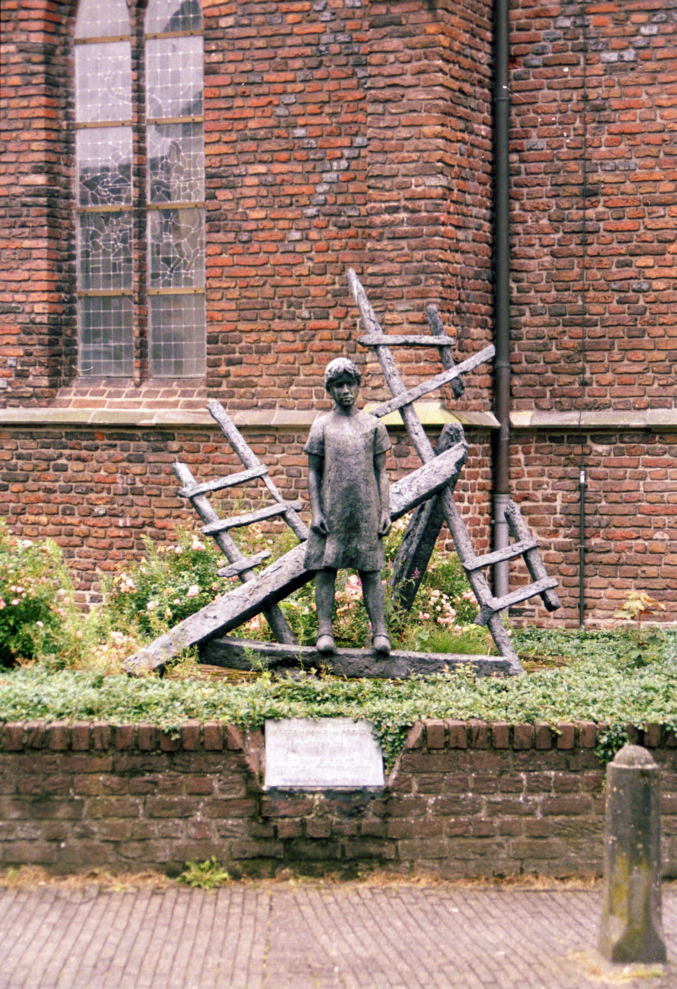 Sculpture/memorial De stormramp van Borculo (1985) by Maïté Duval to commemorate the tornado disaster in Borculo, The Netherlands